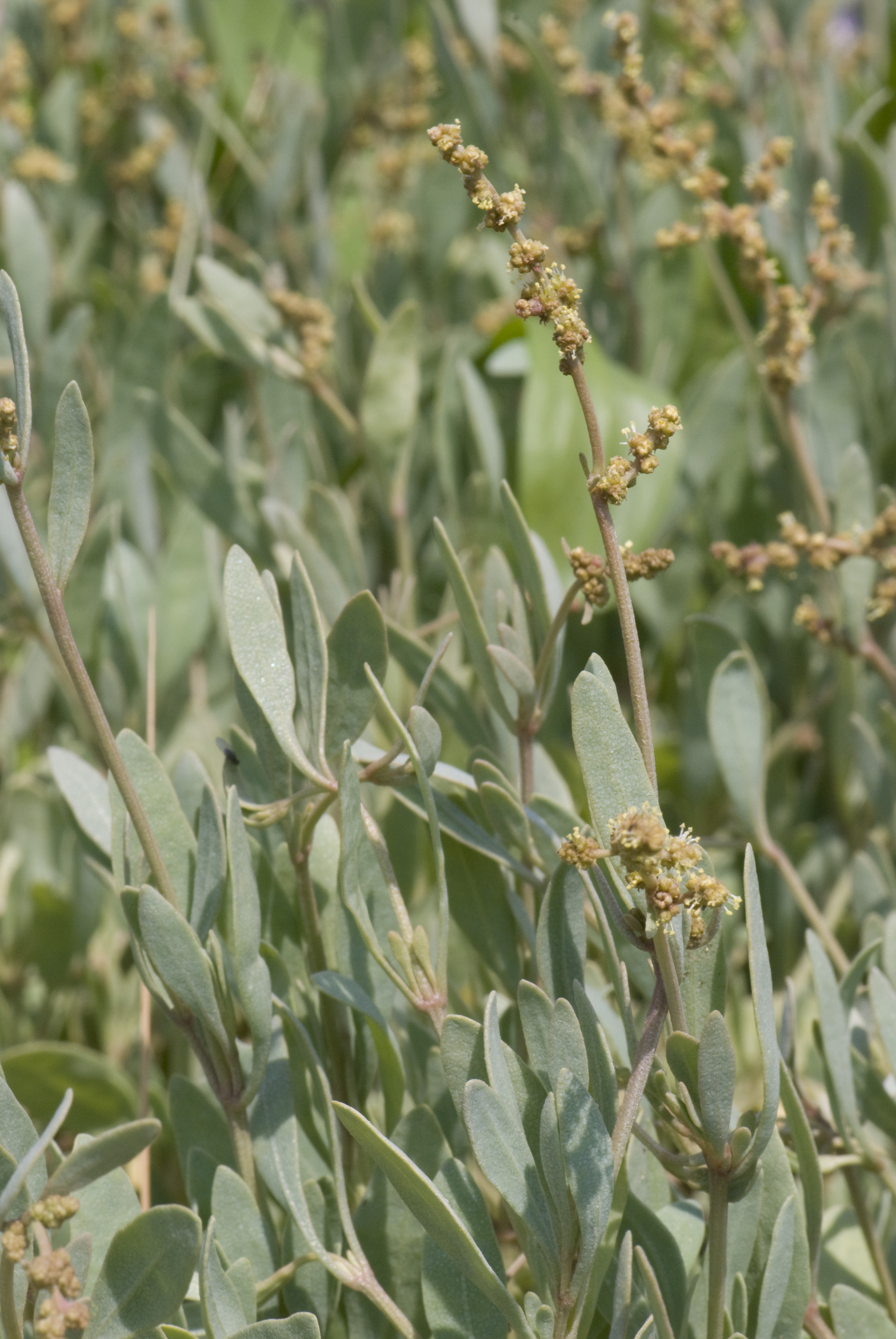 Halimione portulacoides Baie-d'Authie (Somme), France